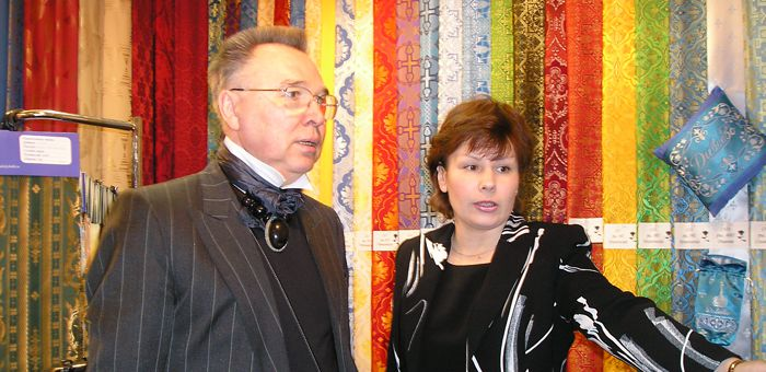 Вячеслав Зайцев в ассортиментном отделе фабрики